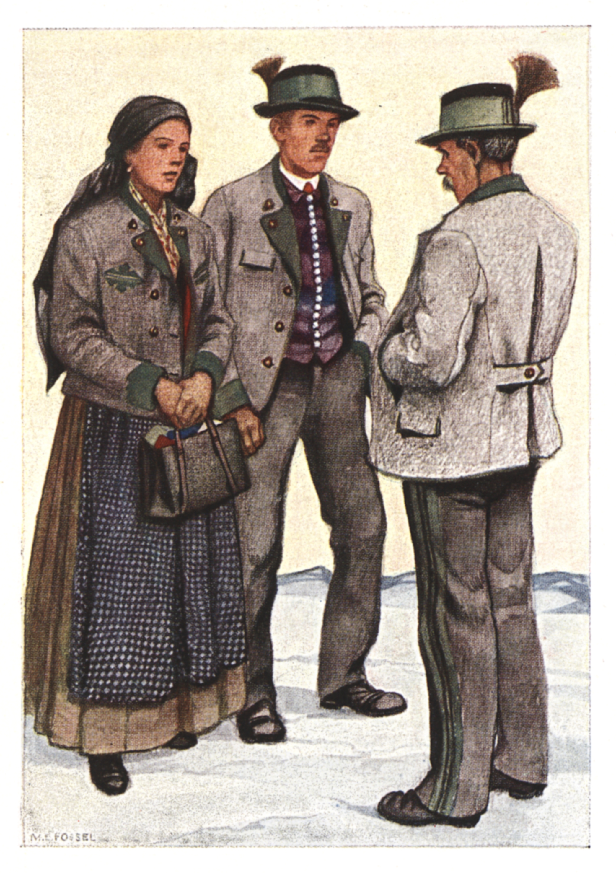 Steirisches Trachtenbuch - Mautner-Geramb 1935 Traditional Costumes from Ennstal, Styria